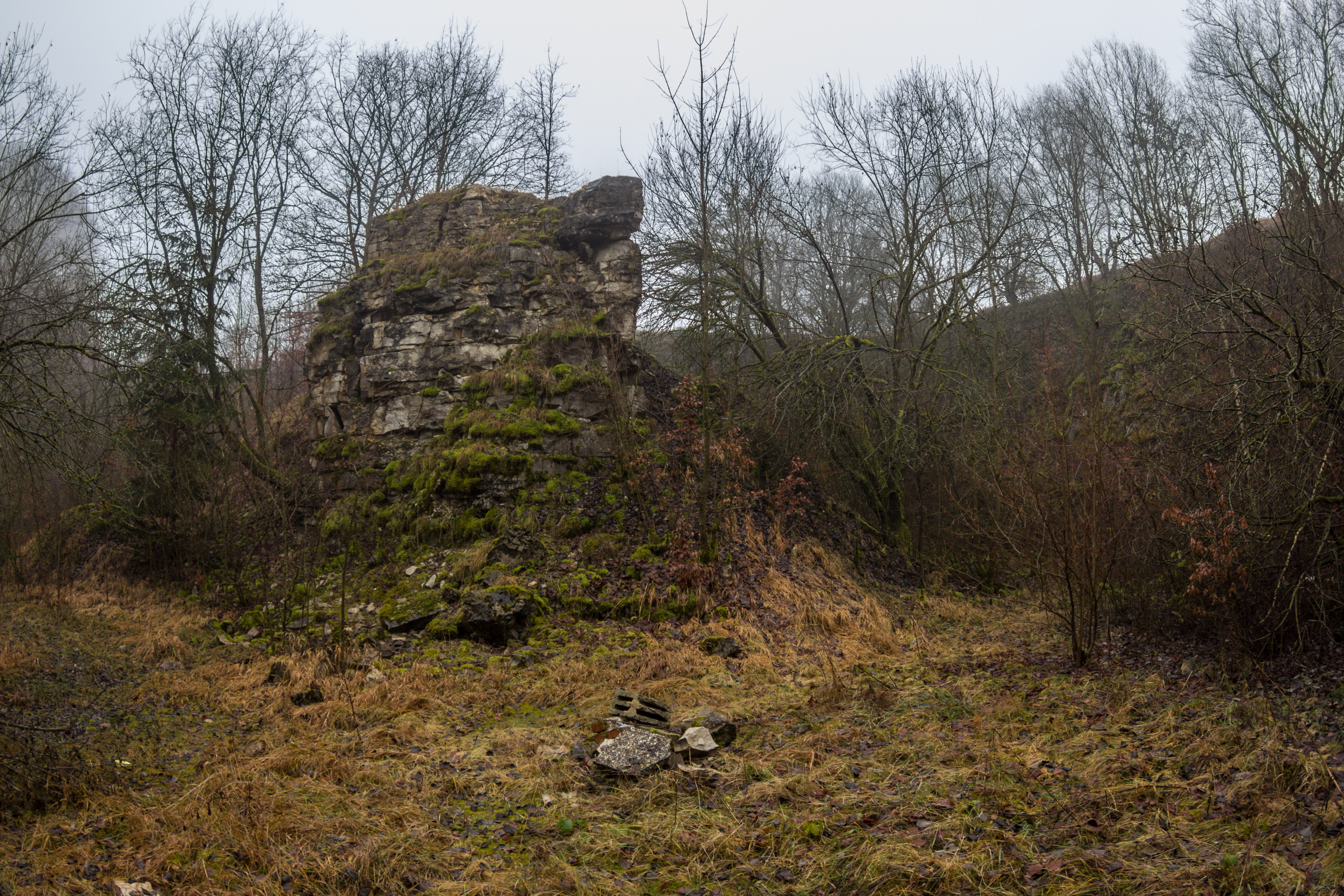 Steinbruch, Kalkstein, Oberrieden, Geotop